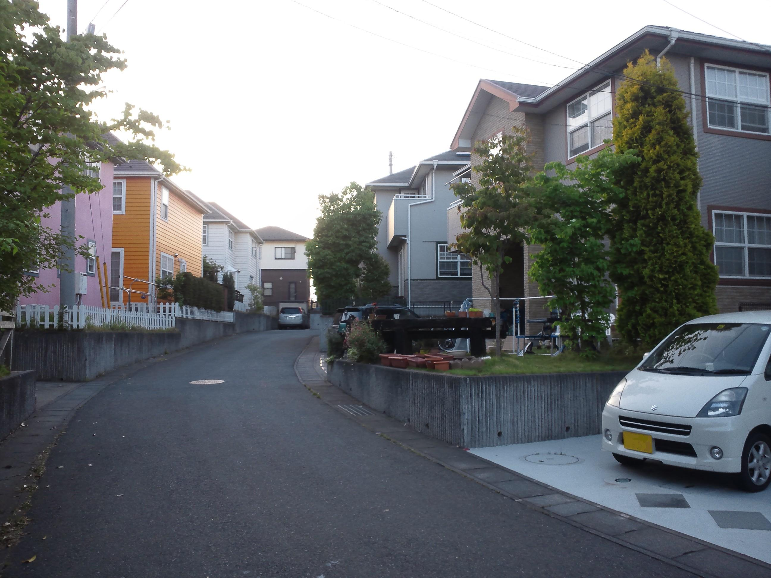 土浦市中 1